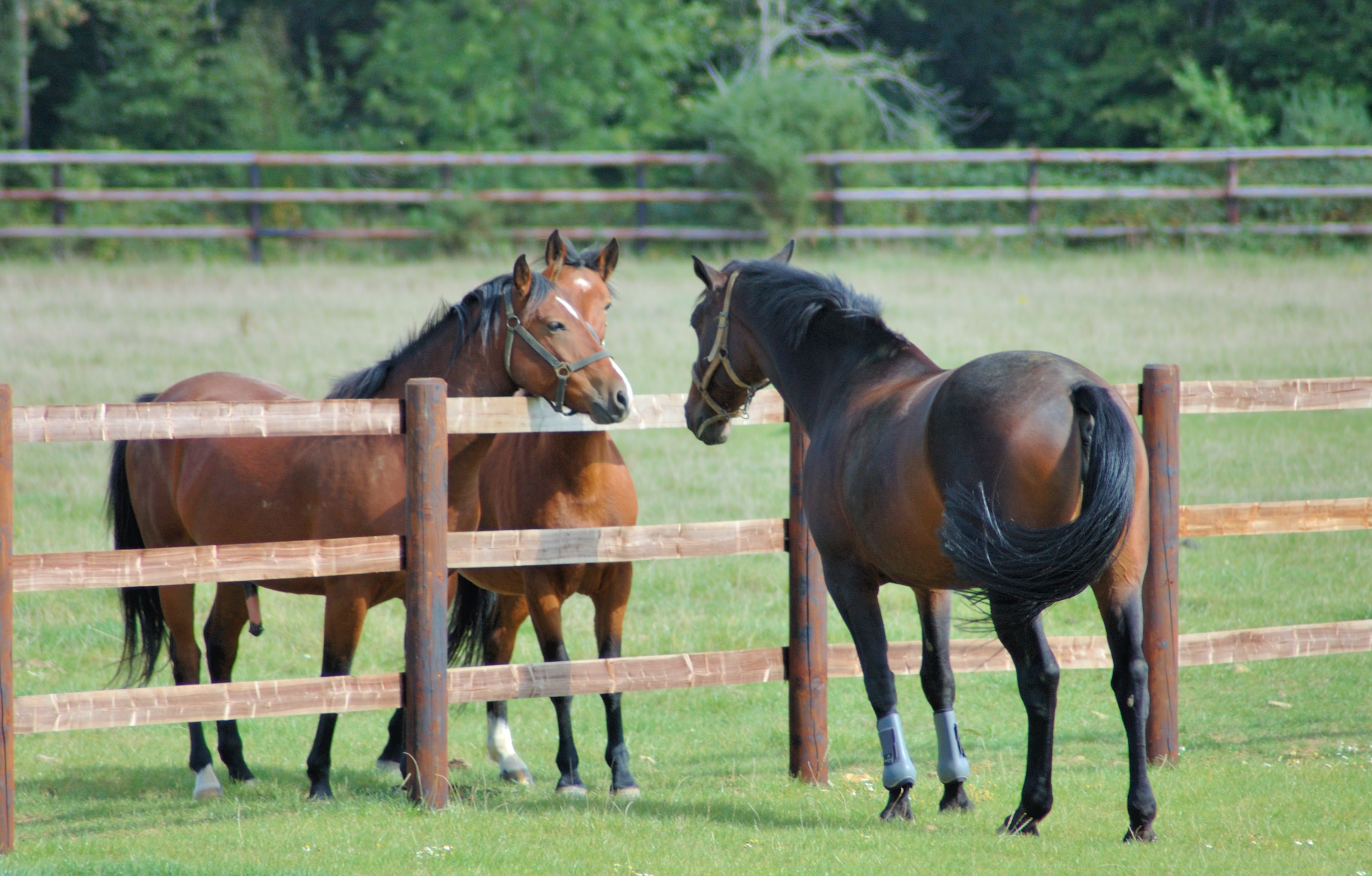 Pierrefitte-en-Cinglais_Les_cours.jpg CALVADOS 14690